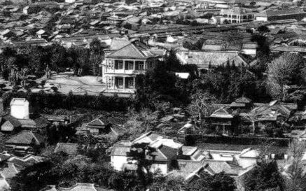 東京駿河台にあった小松宮邸（現・明治大学駿河台キャンパス）